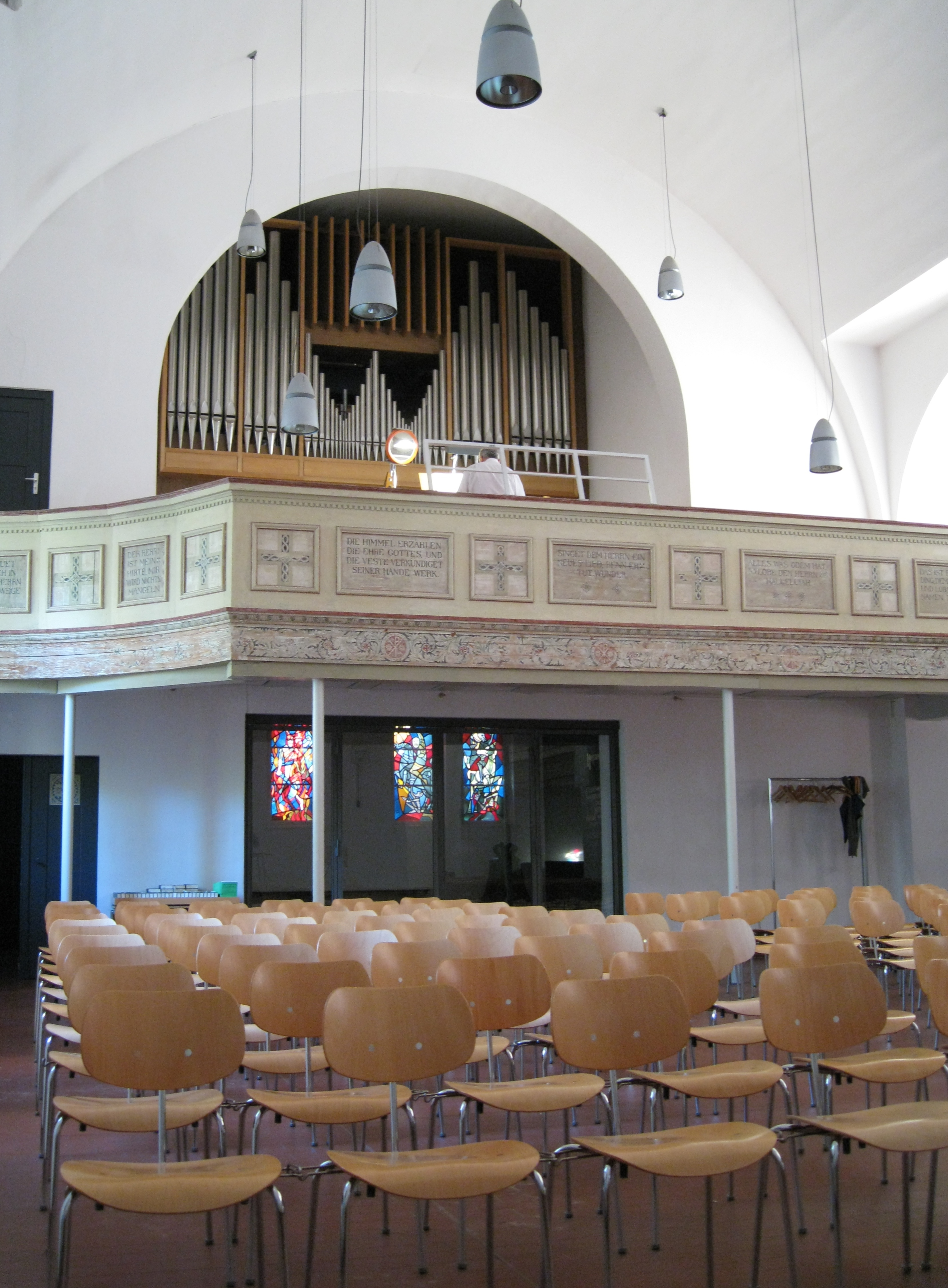 Blick auf die orgel der Johanneskirche Schlachtensee